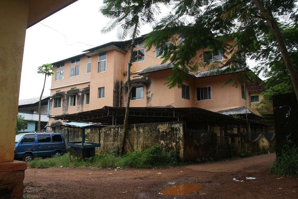 കുന്ദമംഗലം ഗ്രാമപഞ്ചായത്ത് കെട്ടിടം